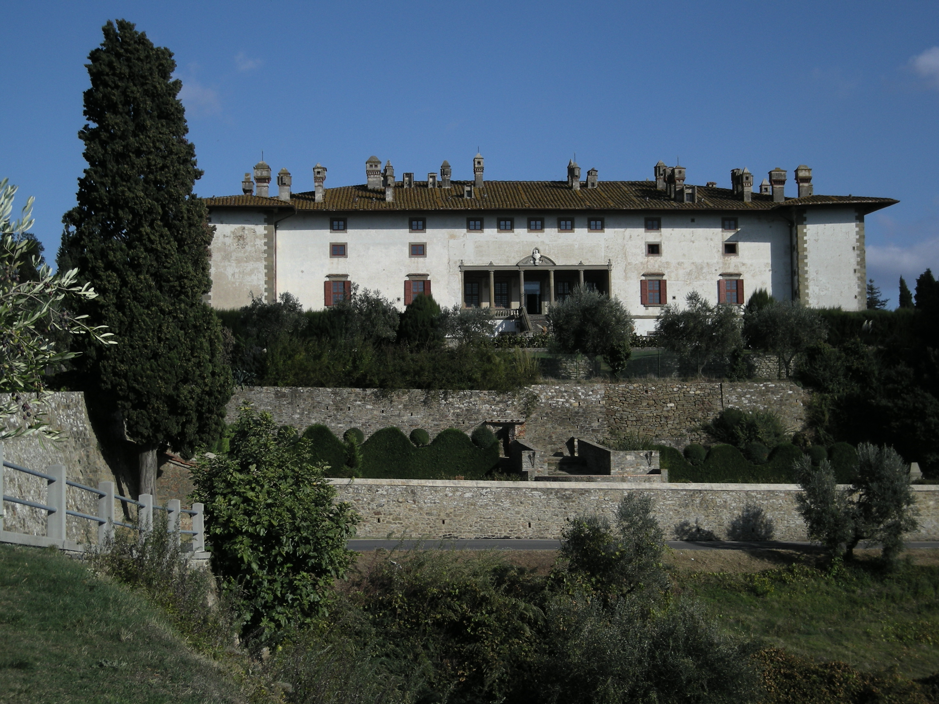 Villa Medicea La Ferdinanda (o dei cento camini) a Artimino (Carmignano - PO)